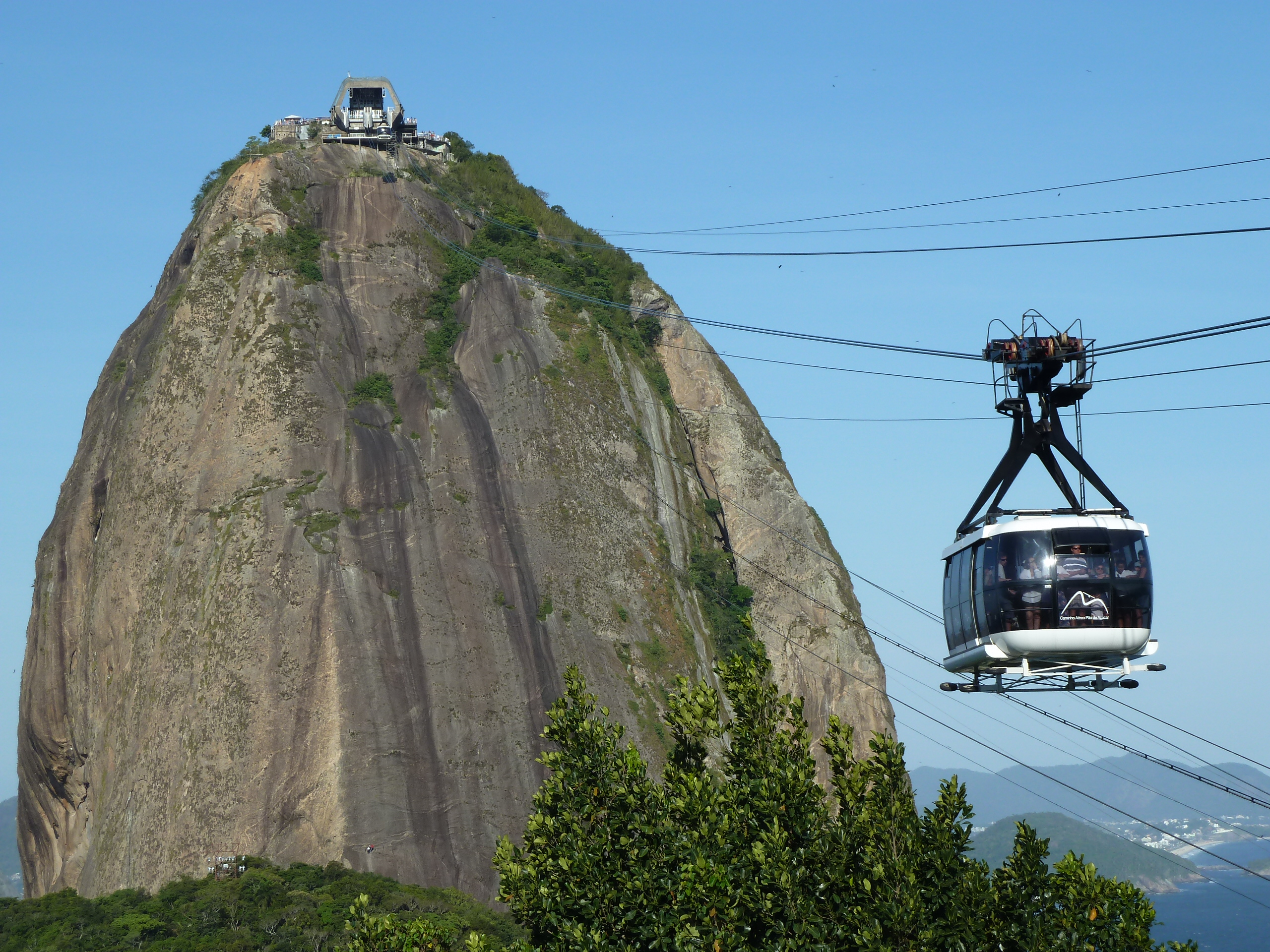 Cable car to Pão de Azúcar